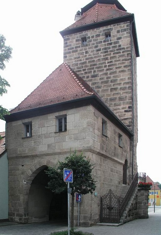 Stadtturm von Höchstadt an der Aisch